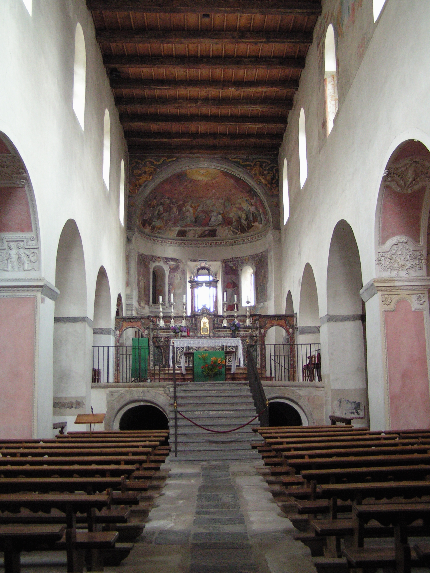 Via San Vittore, Muralto. Intérieur de l'église San Vittore.